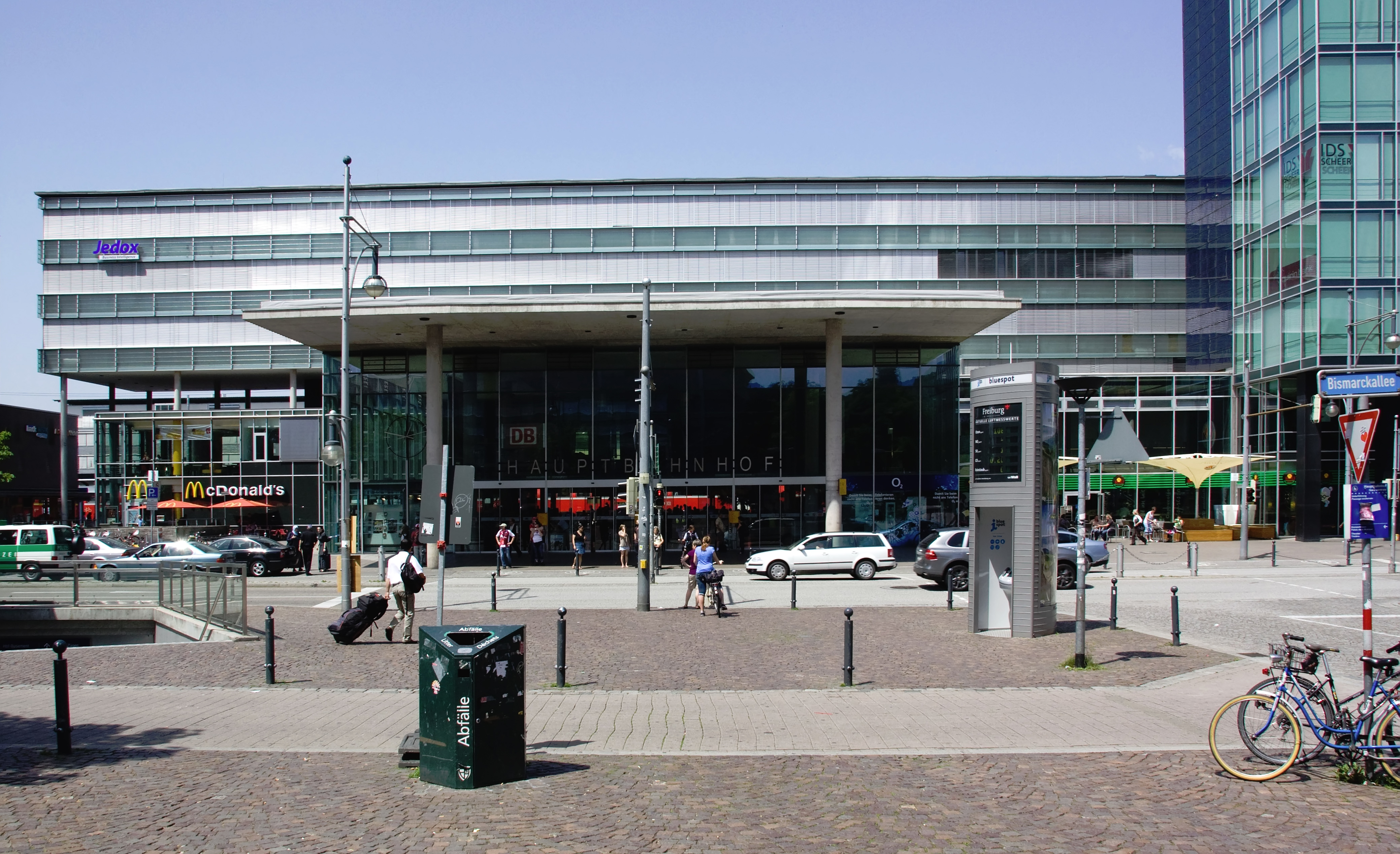 Gare de Fribourg (Freiburg Hauptbahnhof), Freiburg im Breisgau, Allemagne (Germany)